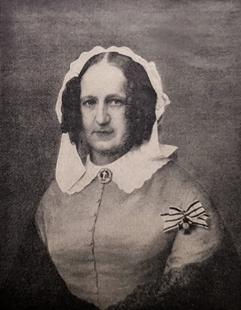 Protrait Mathilde von der Recke Volmerstein mit preußischem Louisenorden [1]